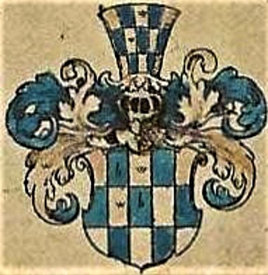 Herb Porschnitz